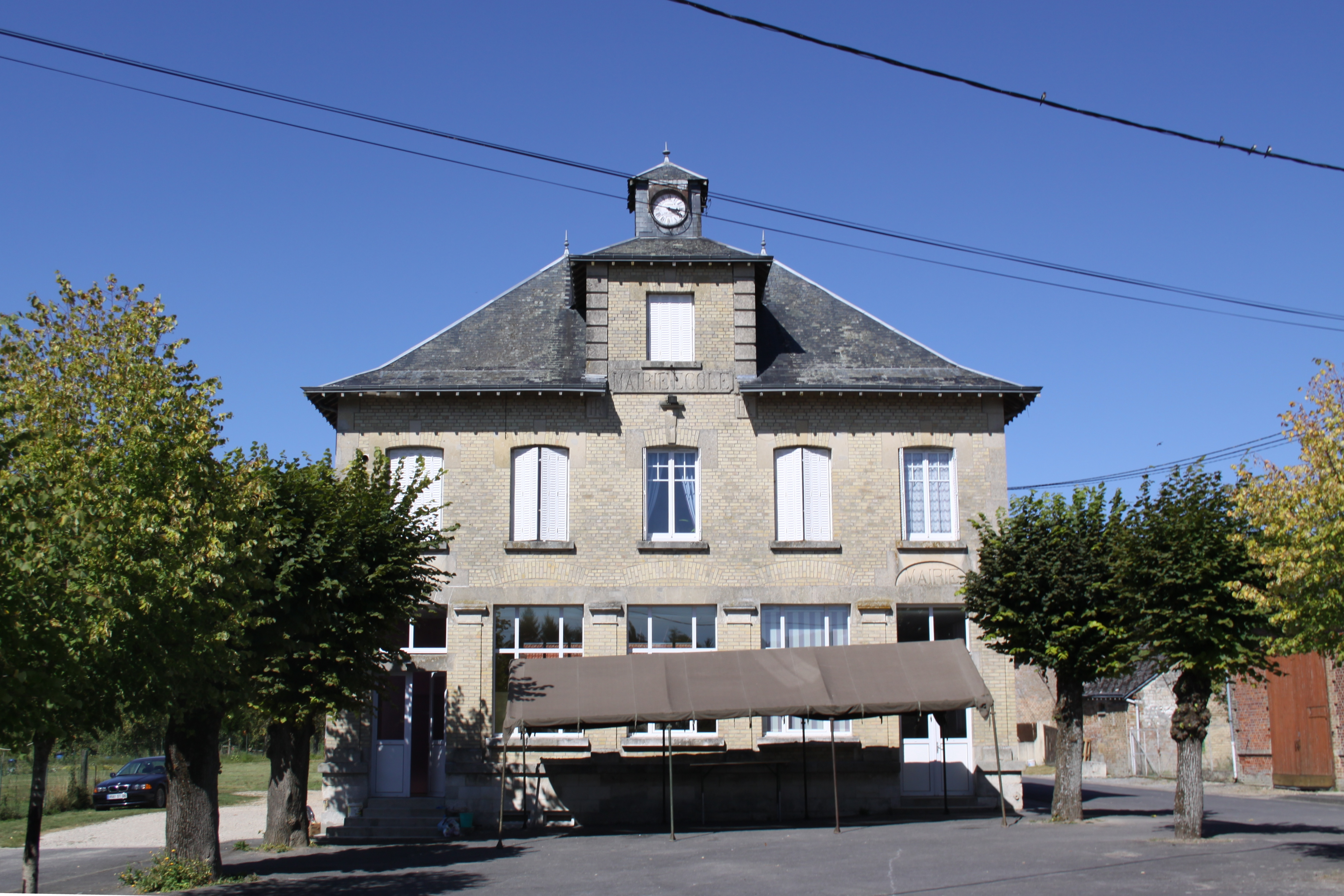 Village Ardennais